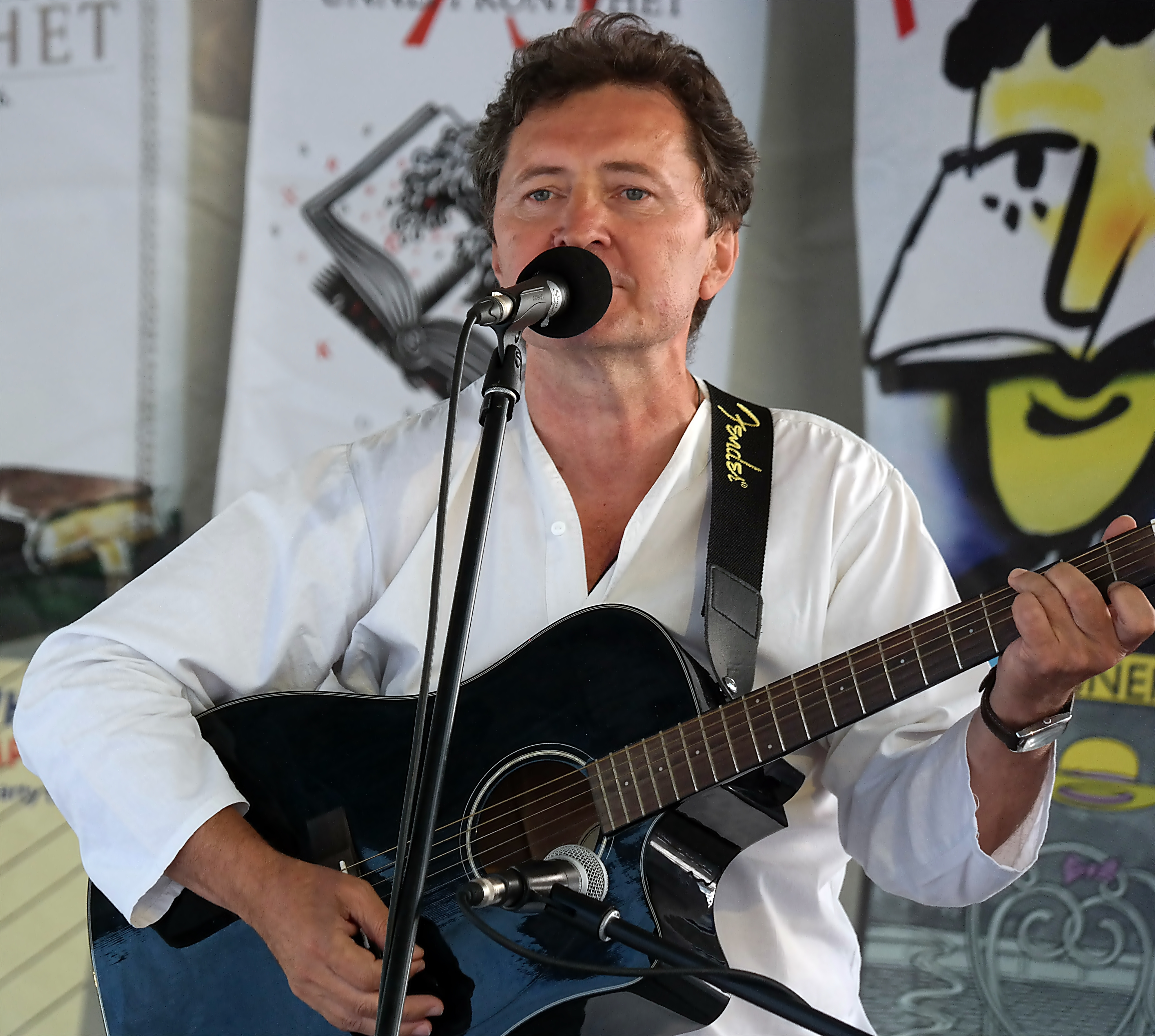 Cselenyák Imre